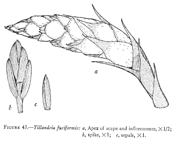 Illustration du protologue de Tillandsia fusiformis L.B.Sm. (réorganisée)